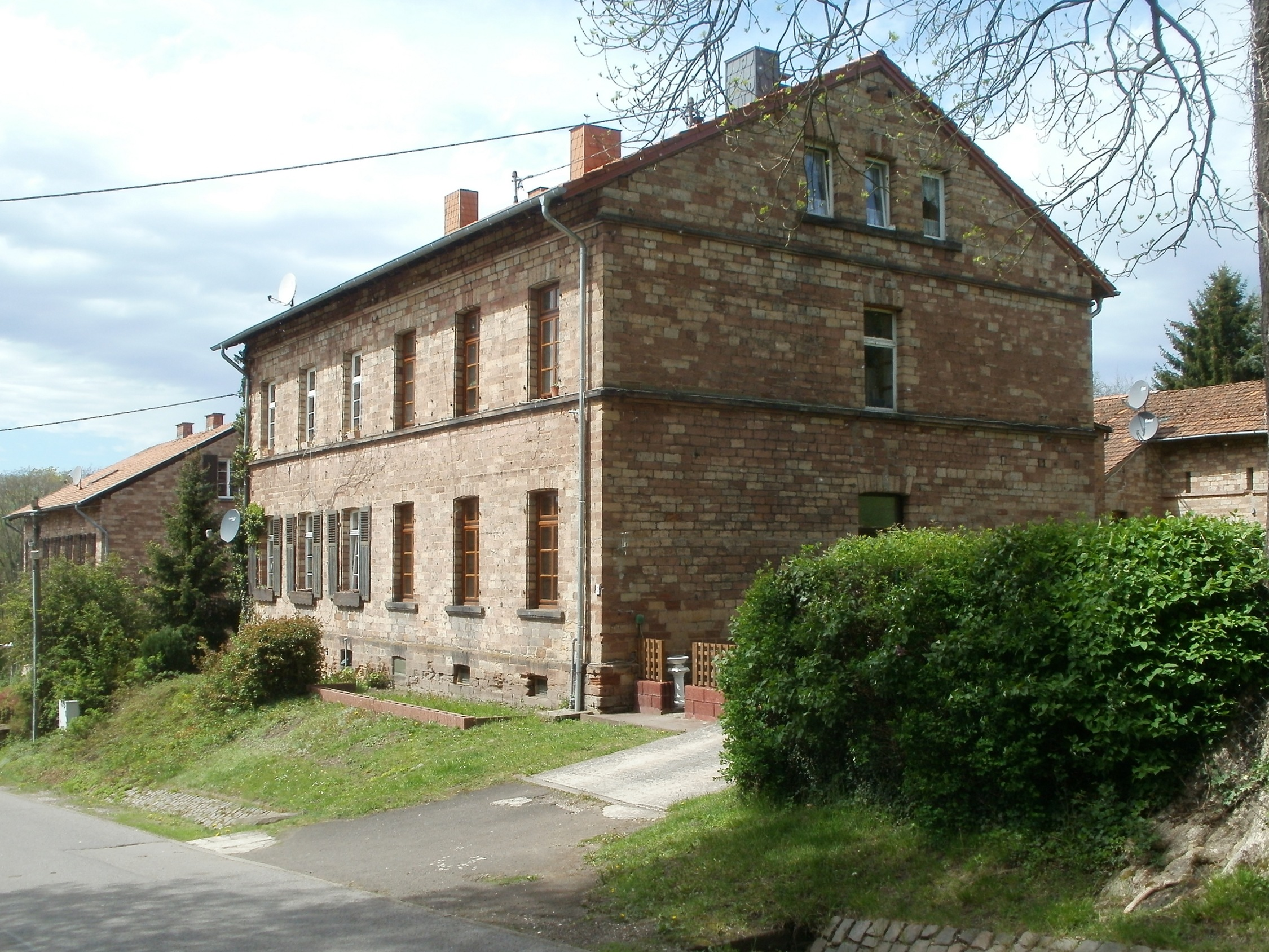 Grubensiedlung Von der Heydt (Saarbrücken)